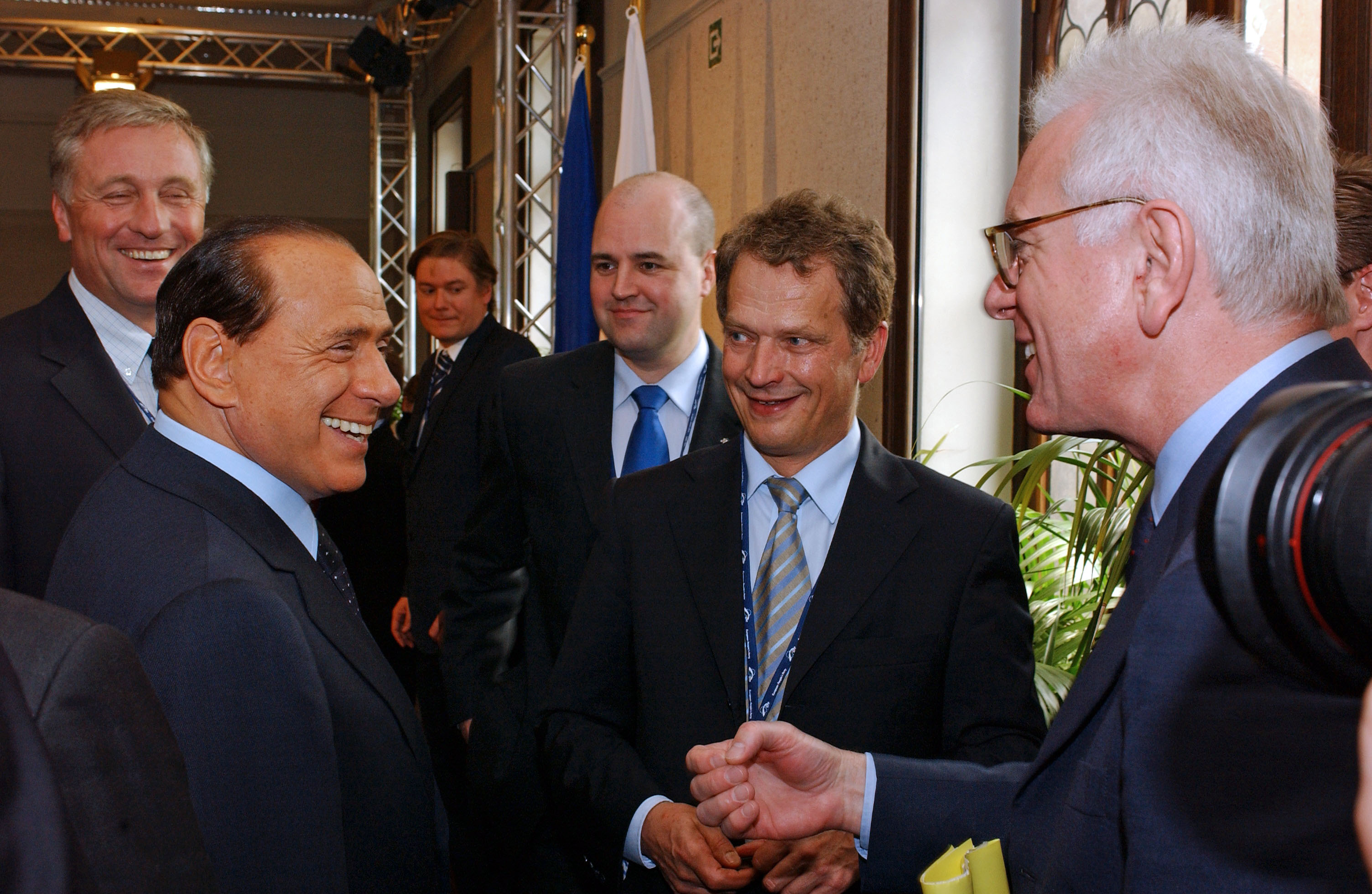 EPP Summit 16 June 2005